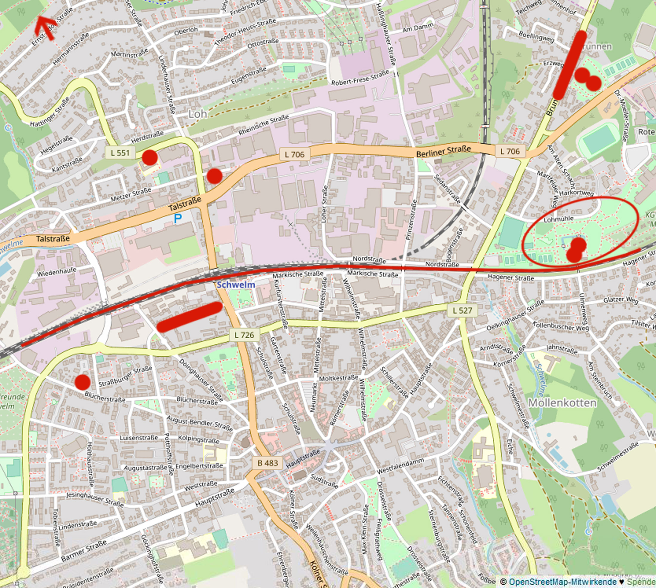 Lage von Bau- und Bodendenkmälern in Schwelm, Bereich äußere Stadt nördlich. (Oben außerhalb ergänzt sich noch das Gut Oberberge.) Kartenvorlage aus OpenStreetMap wurde um Markierungen (rot) ergänzt.